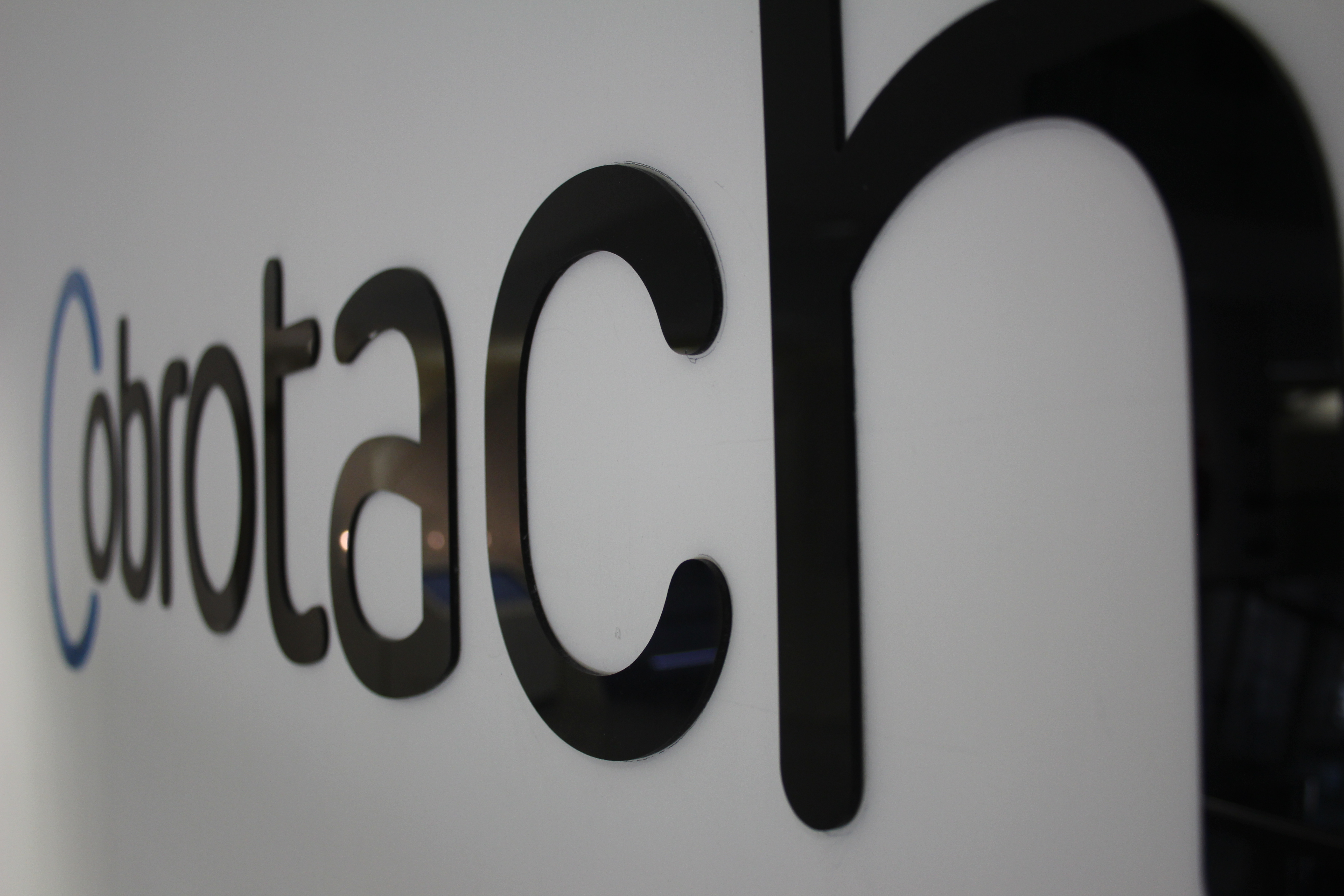 Wystawa stała "O obrotach"